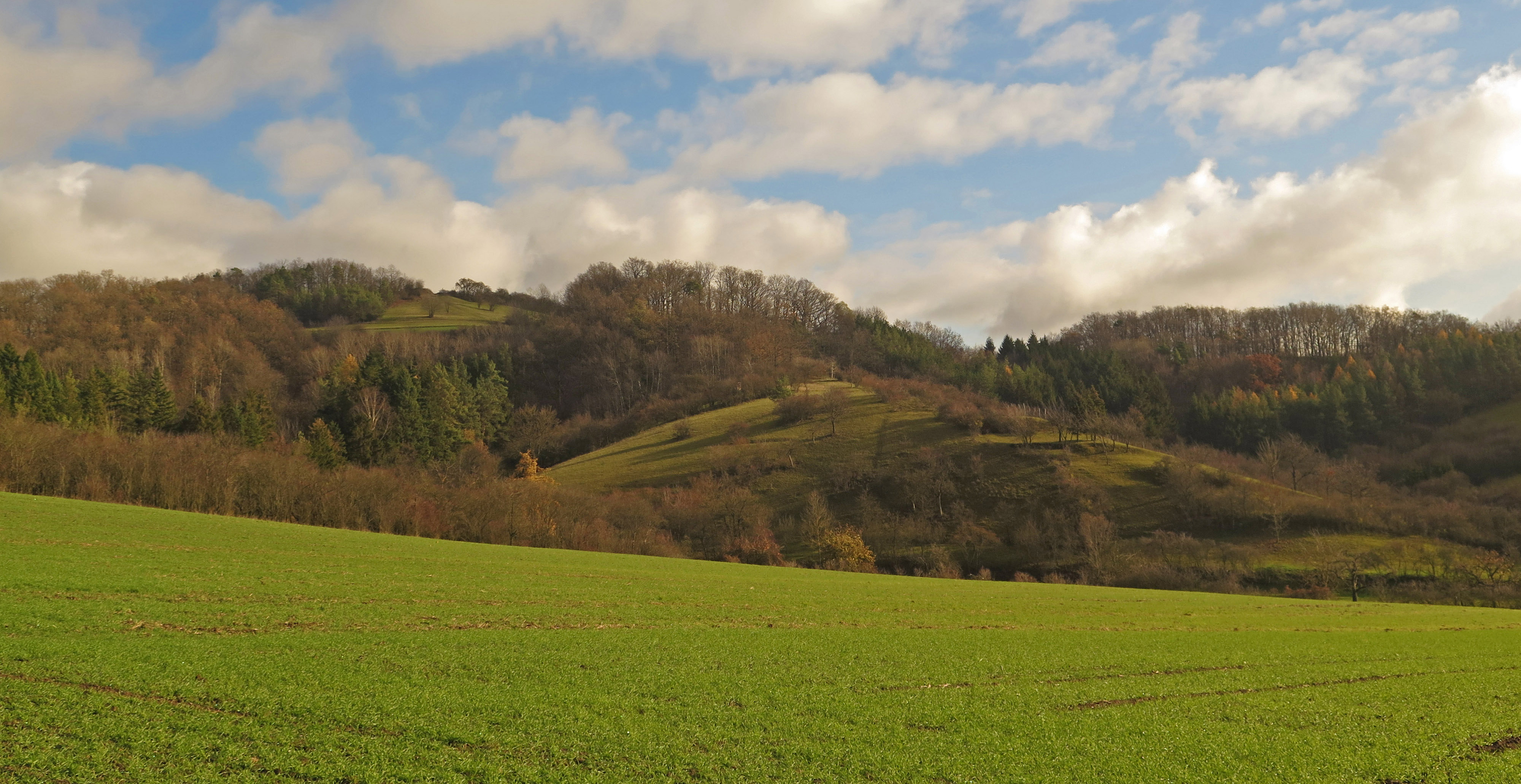 (NSG:BY-NSG-00517.01)_Hohe Wann